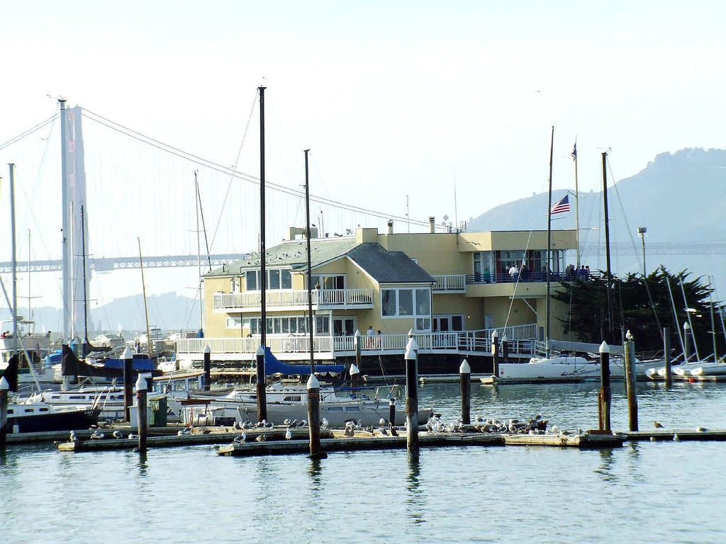 San Francisco